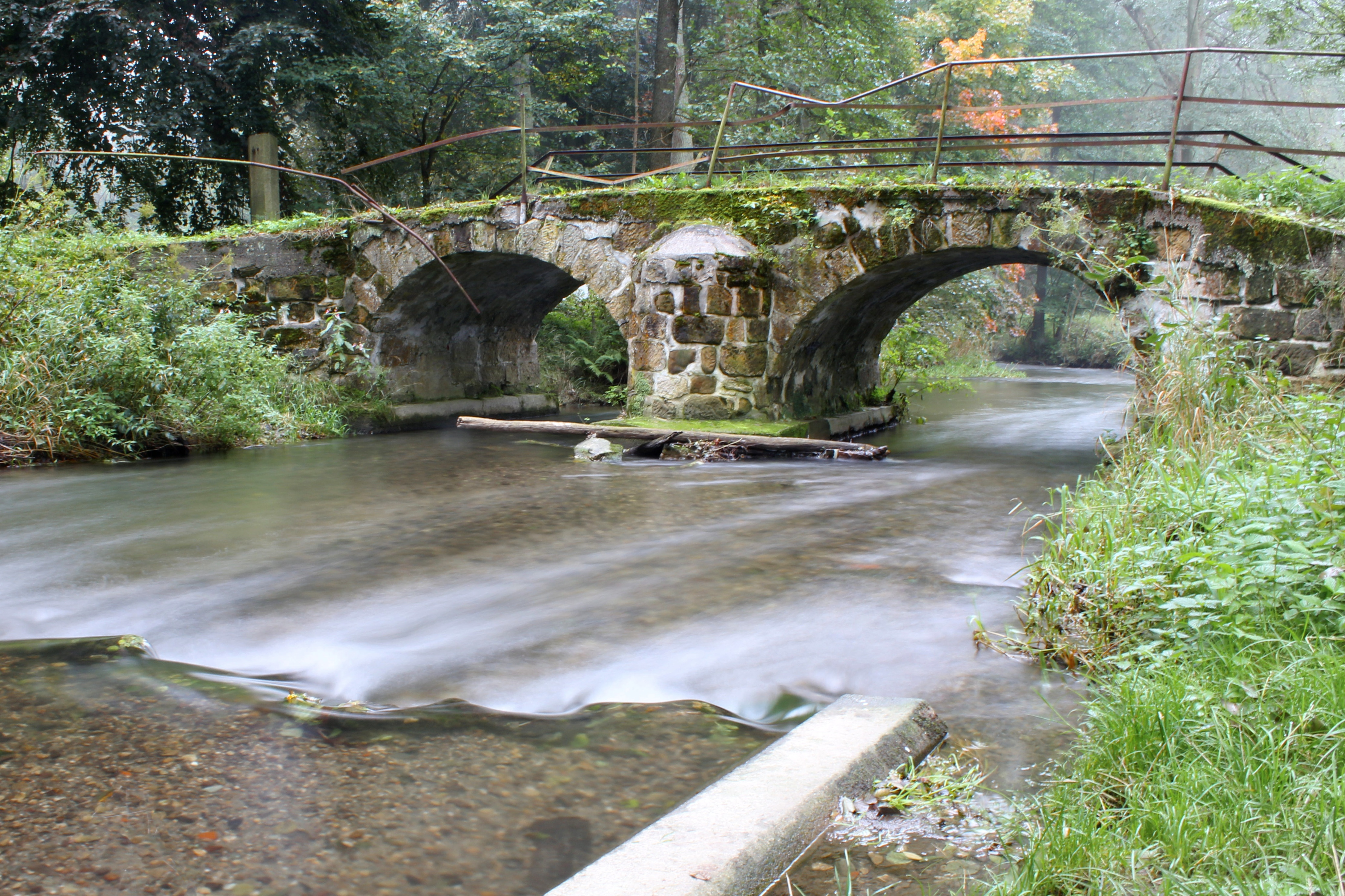 Kamenný most přes mohelku, Radostín